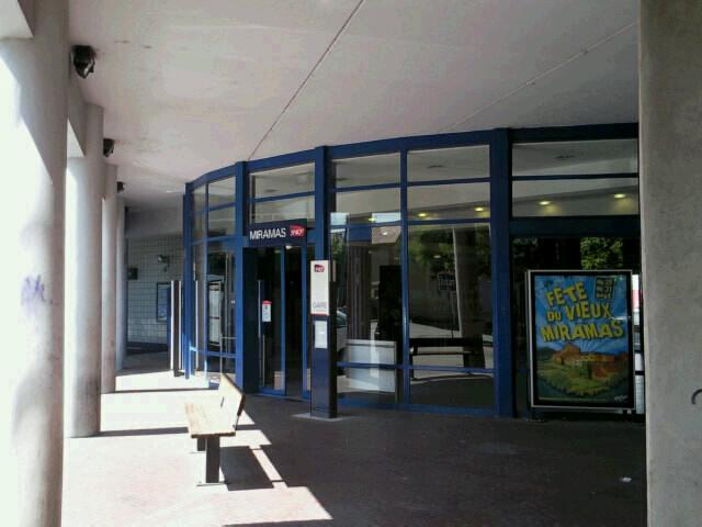 L'entrée du bâtiment de la gare de Miramas, Bouches-du-Rhône, France